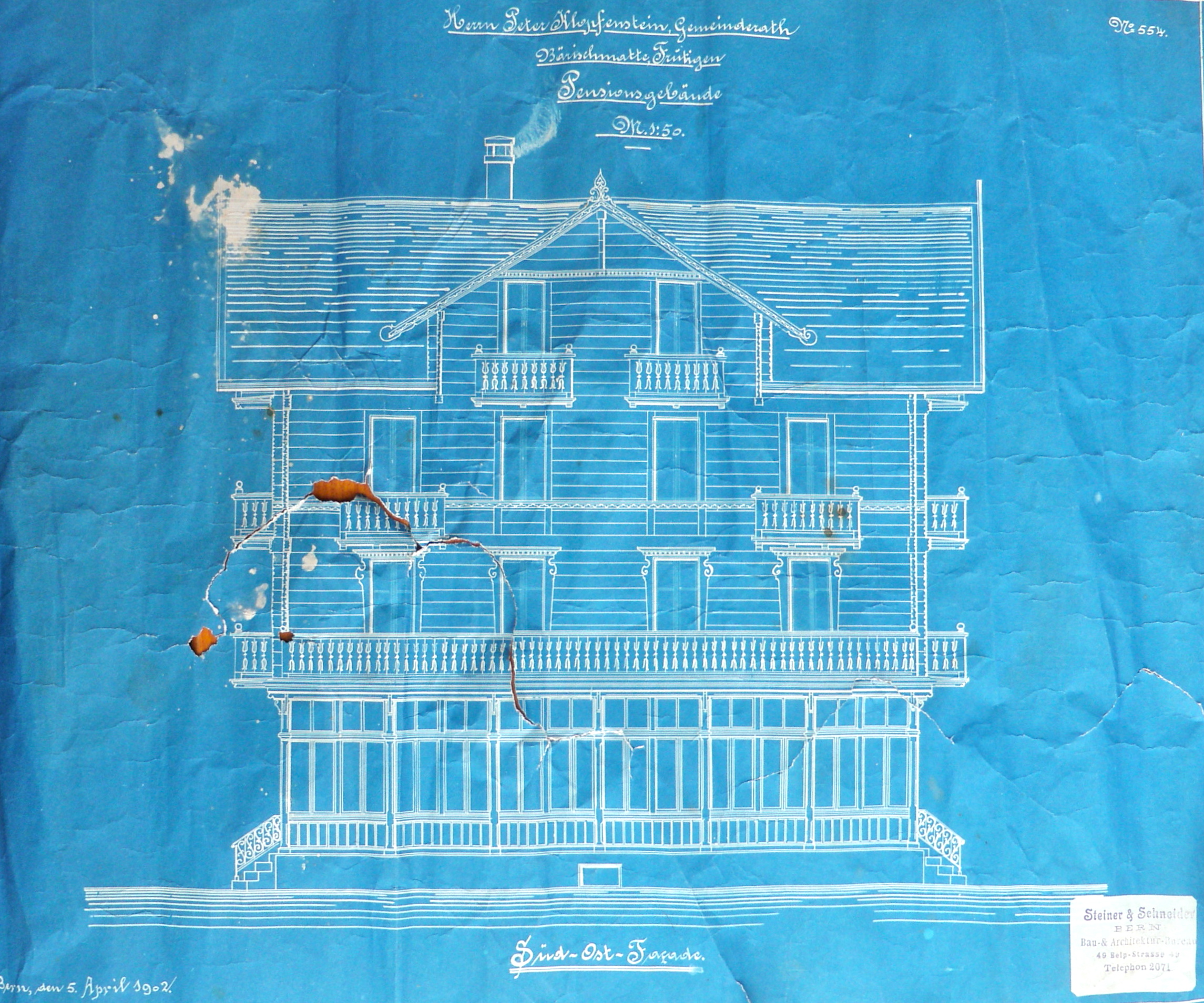 Hotel Waldhaus Gasterntal: Blaupause 1902